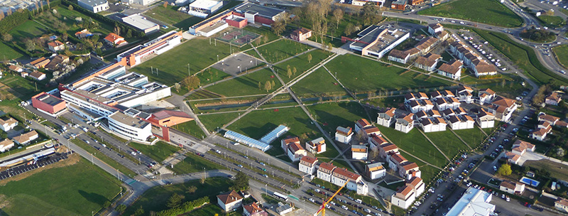 Vue aérienne du campus de l'Enap